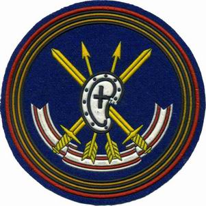 Нарукавная нашивка 28 гв. рд (УХО)